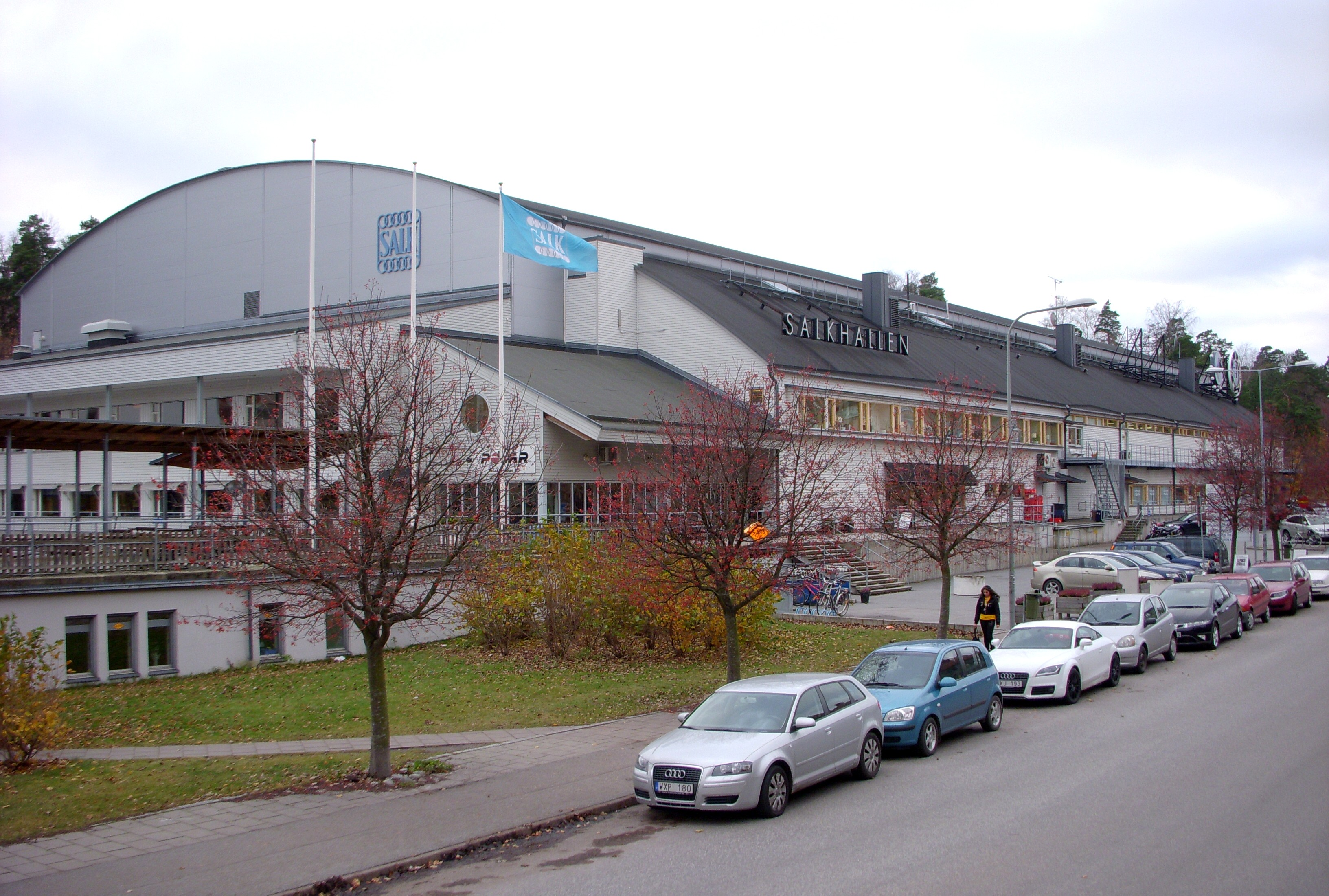 SALK-hallen i Alvik, Bromma